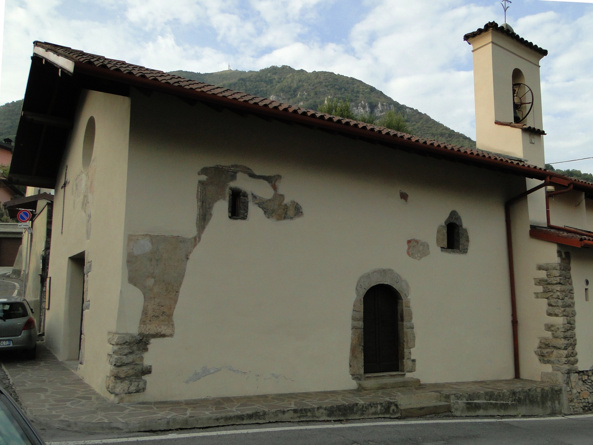 Comenduno, fraz. di Albino (BG), chiesa di santa Maria